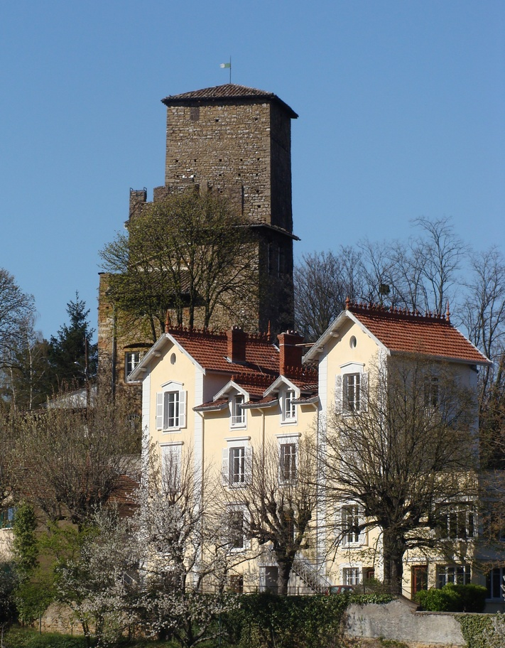 Le vieux château d'Albigny vu depuis le village